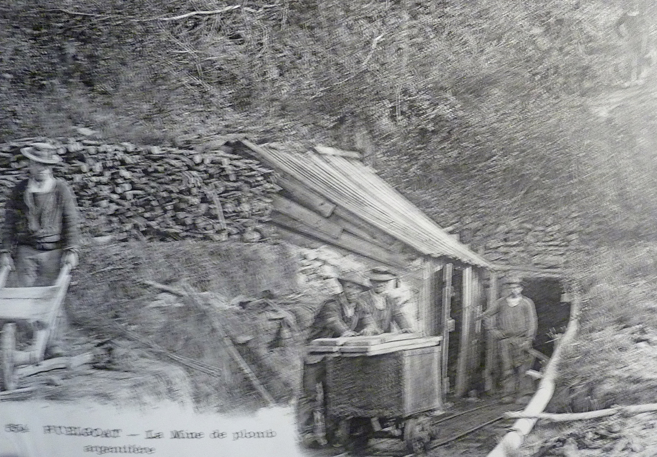 Huelgoat : la mine de plomb argentifère vers la fin du XIXe siècle (photographie, auteur inconnu).